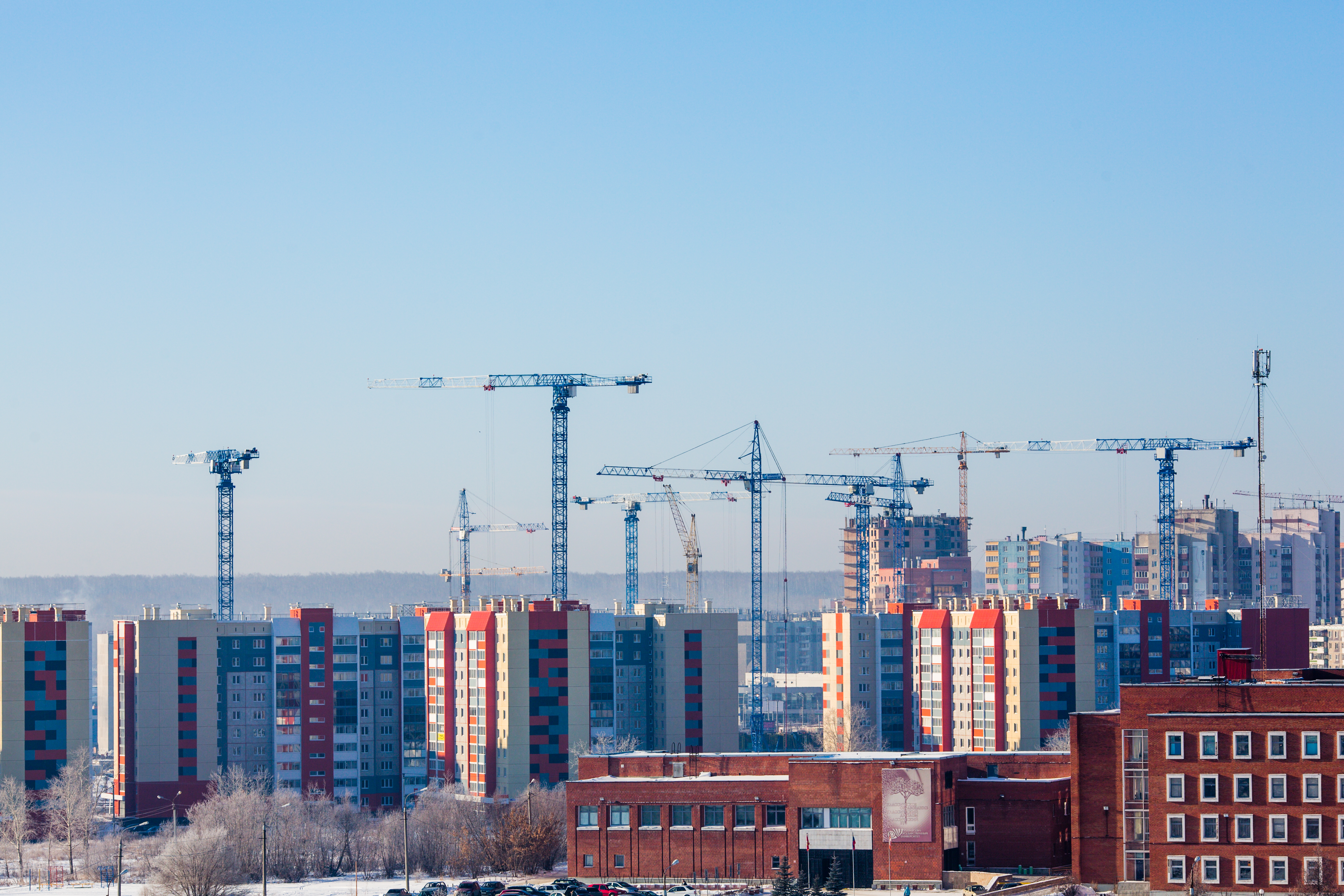 Башенные краны производства ЛМЗ на строительстве нового района в Челябинске